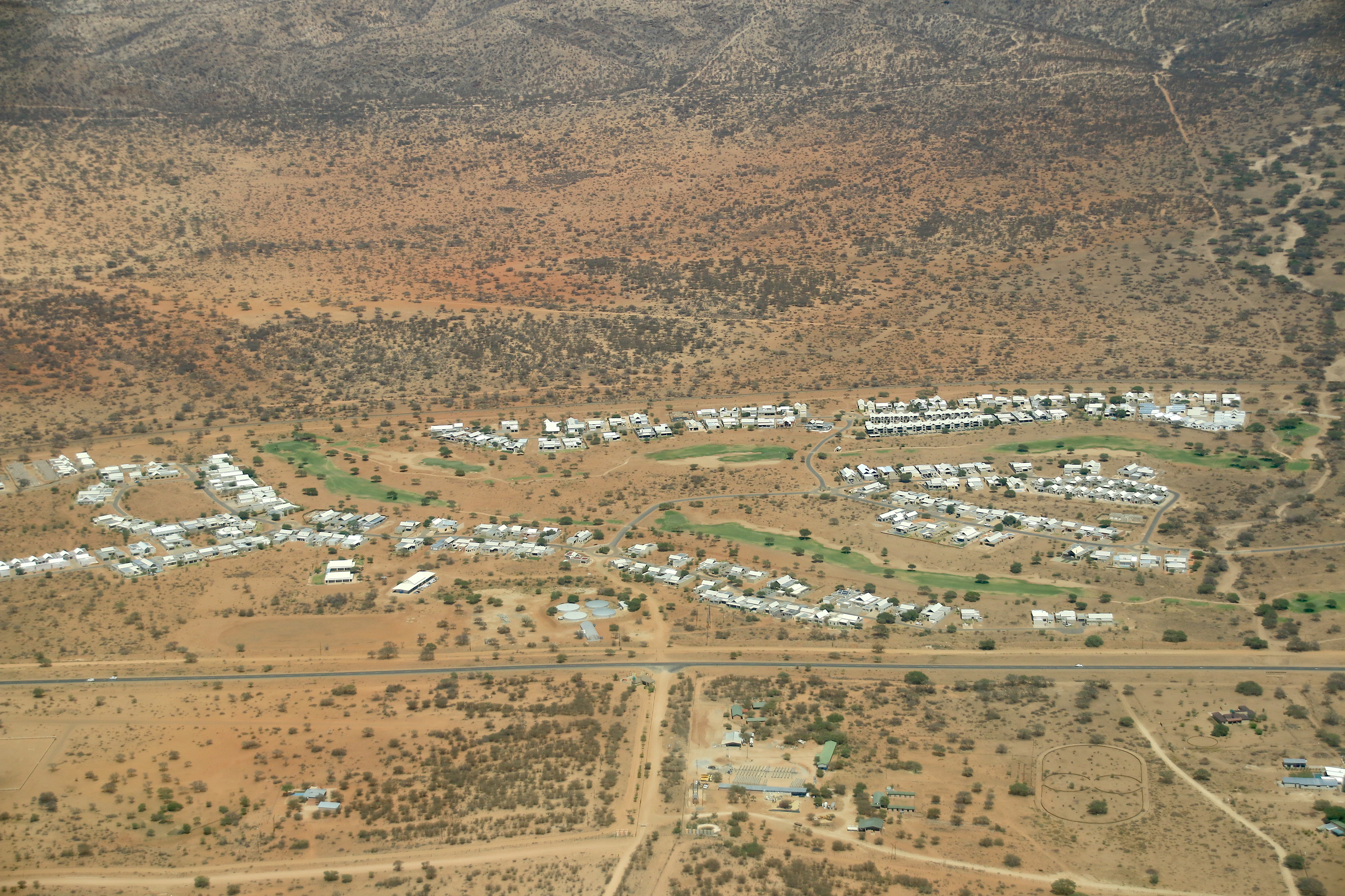 Omeya (2919)